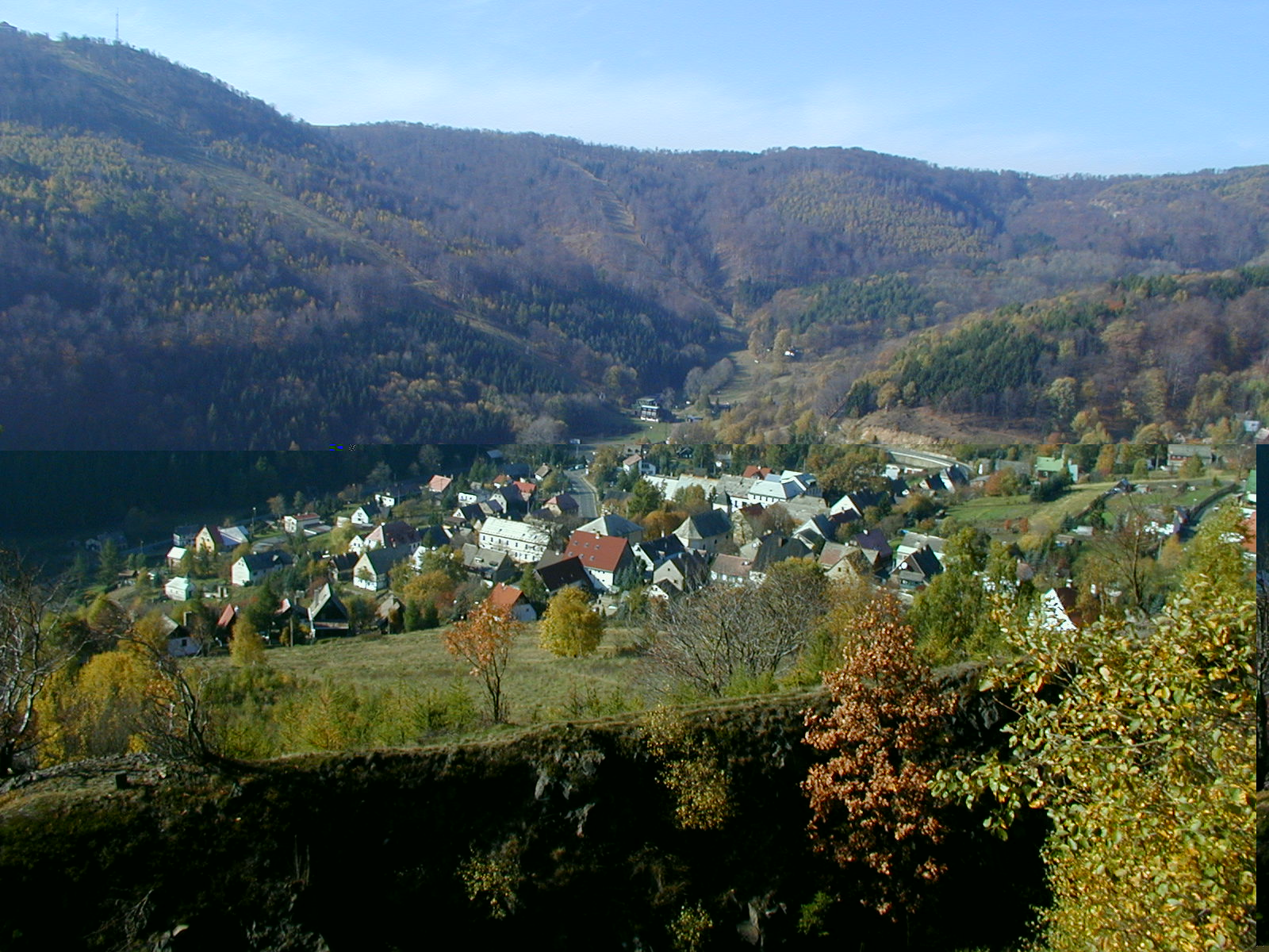 Pohled na Mikulov